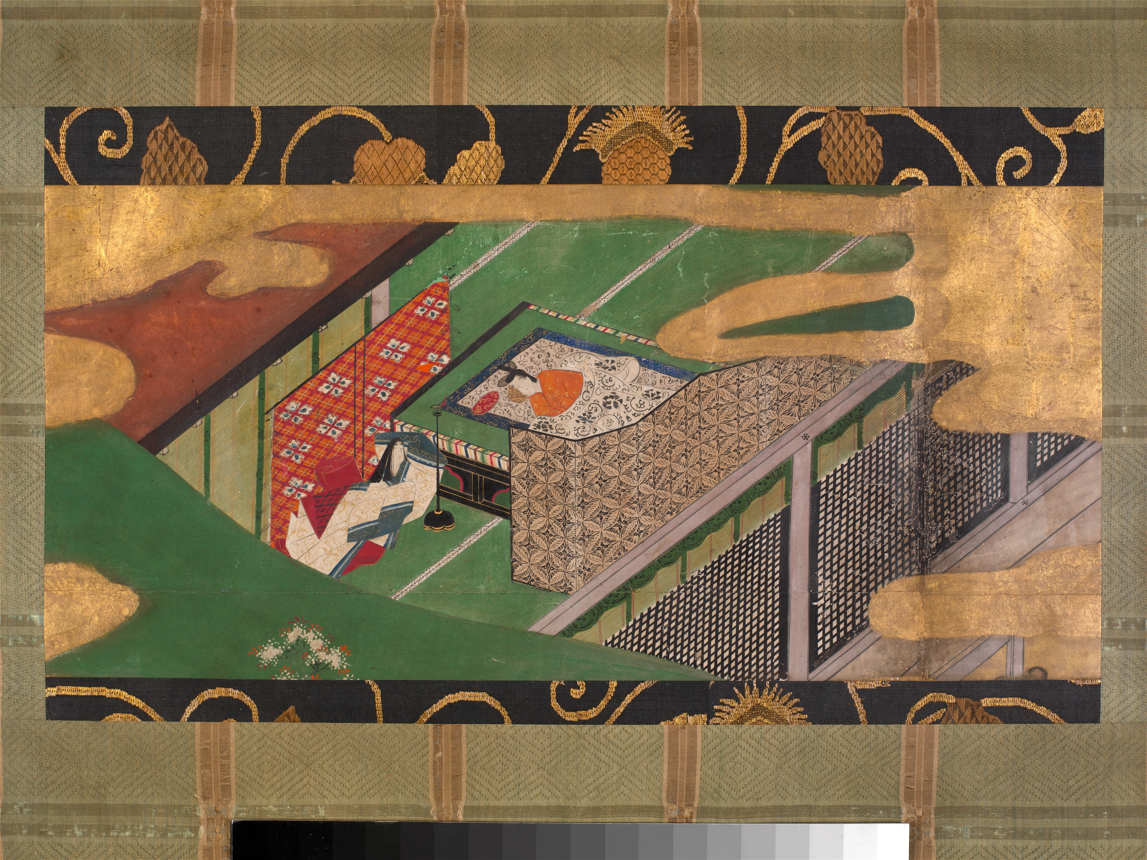 Japan; Hanging scroll; Paintings